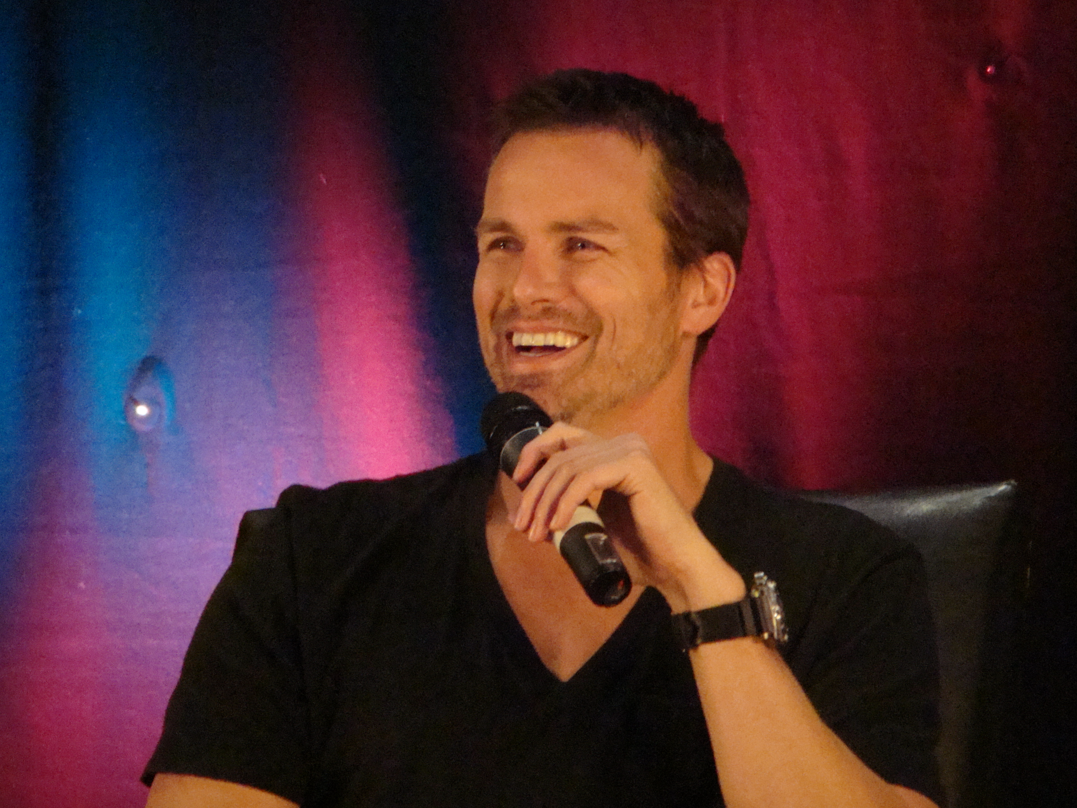 Brody Hutzler